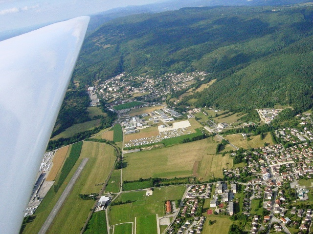 Vues aériennes du planeur Alliance 34 F-CIHP